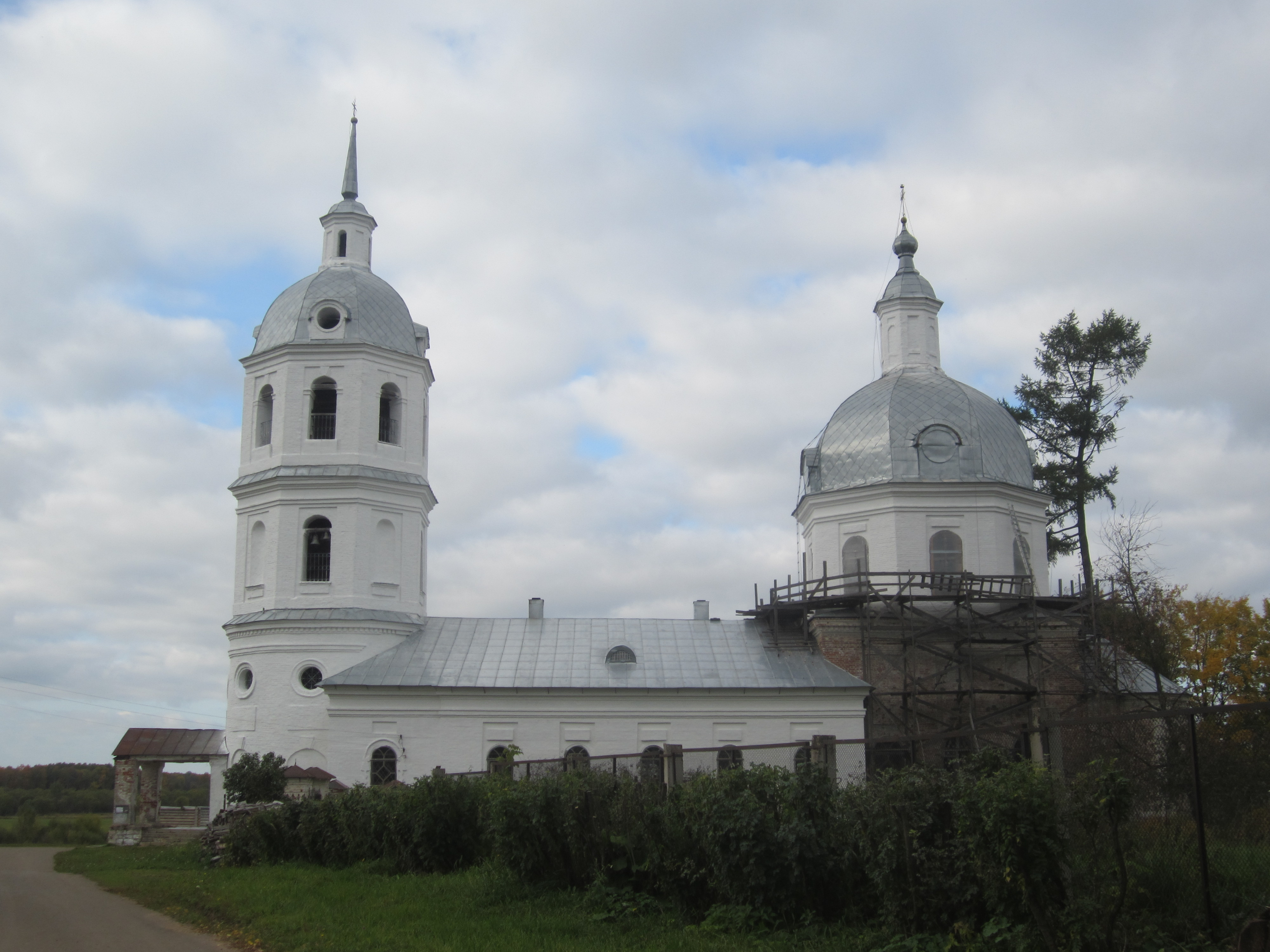 Троицкая церковь с интерьером: Истобенск, Оричевский район, Кировская область